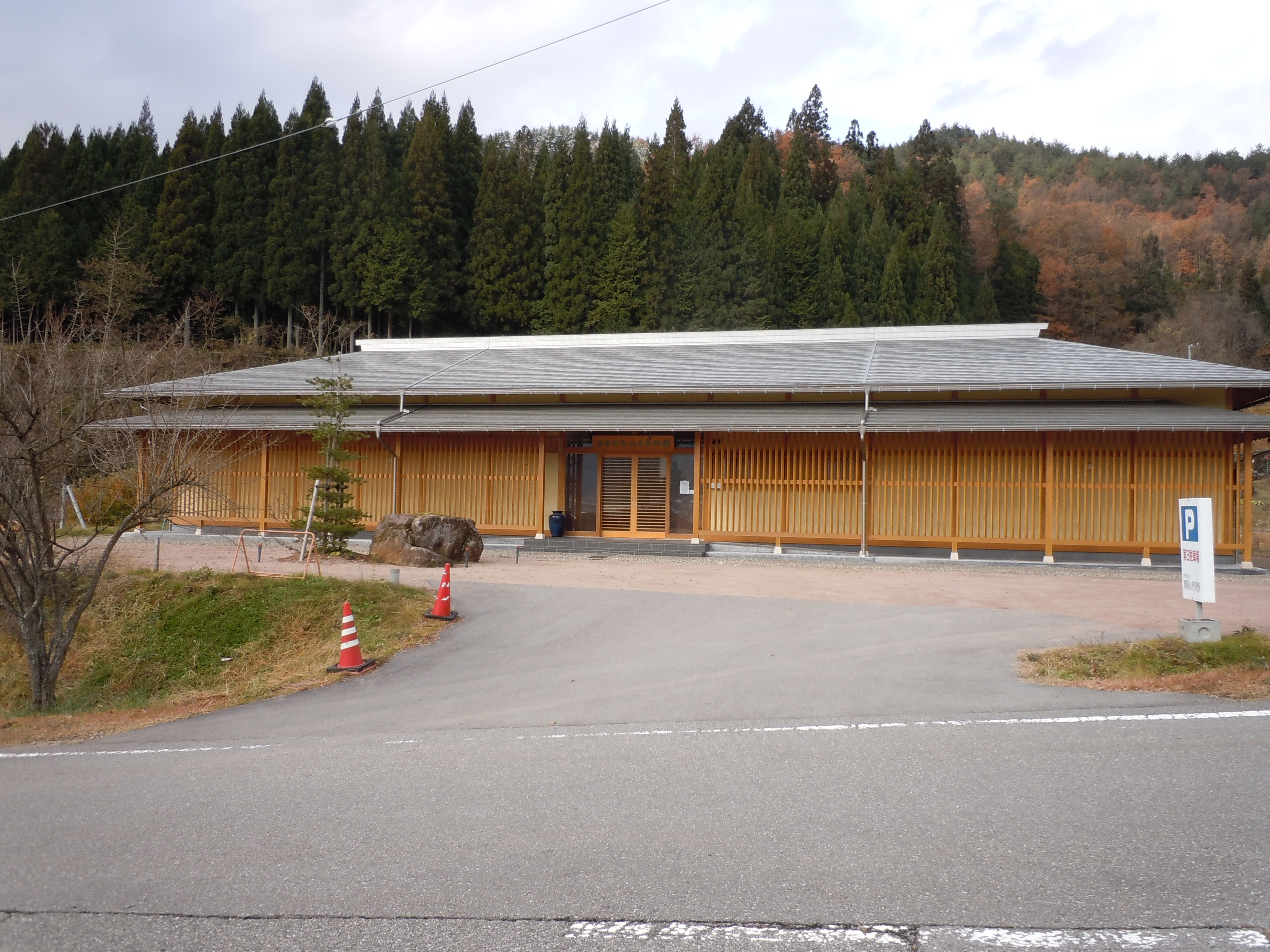 飛騨福来心理学研究所 岐阜県高山市国府町八日町